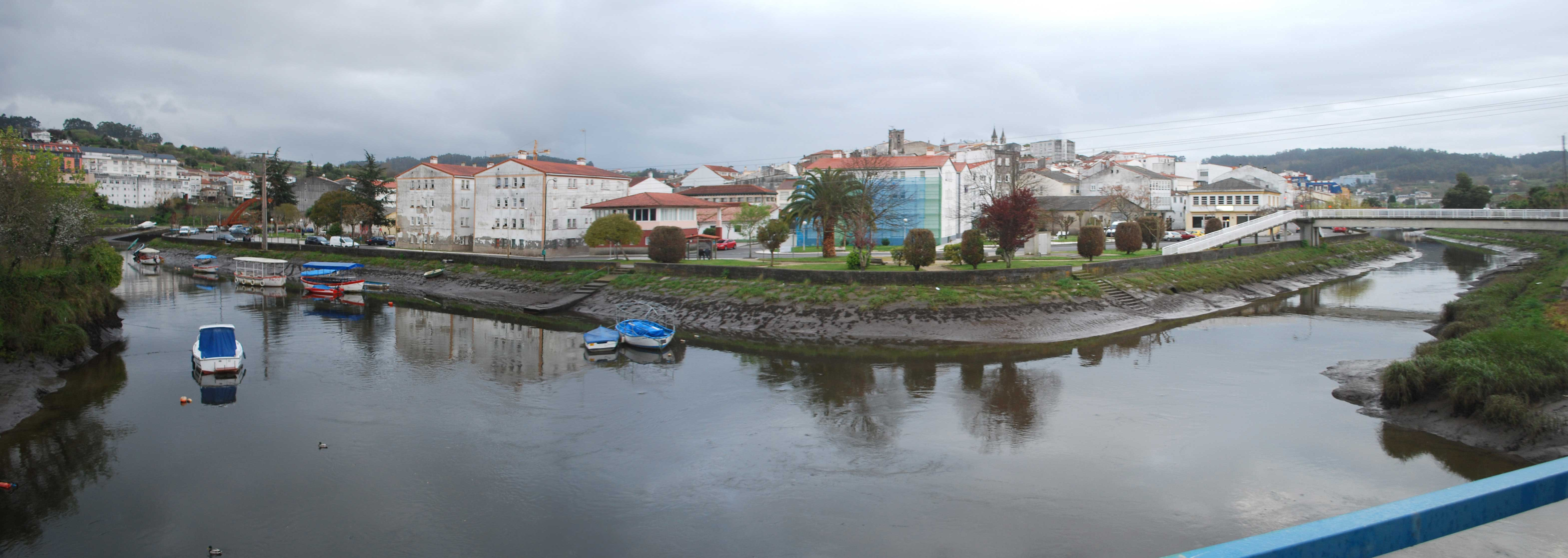 Desembocadura do Río Mandeo e Mendo na ría de Betanzos